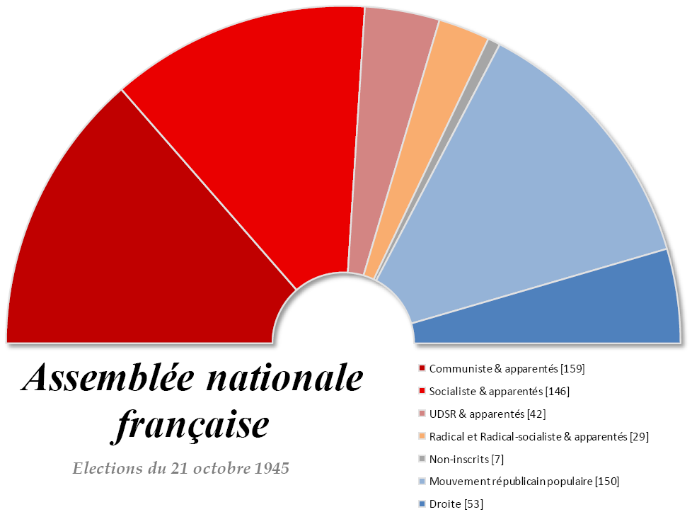 L'Assemblée nationale française 1945